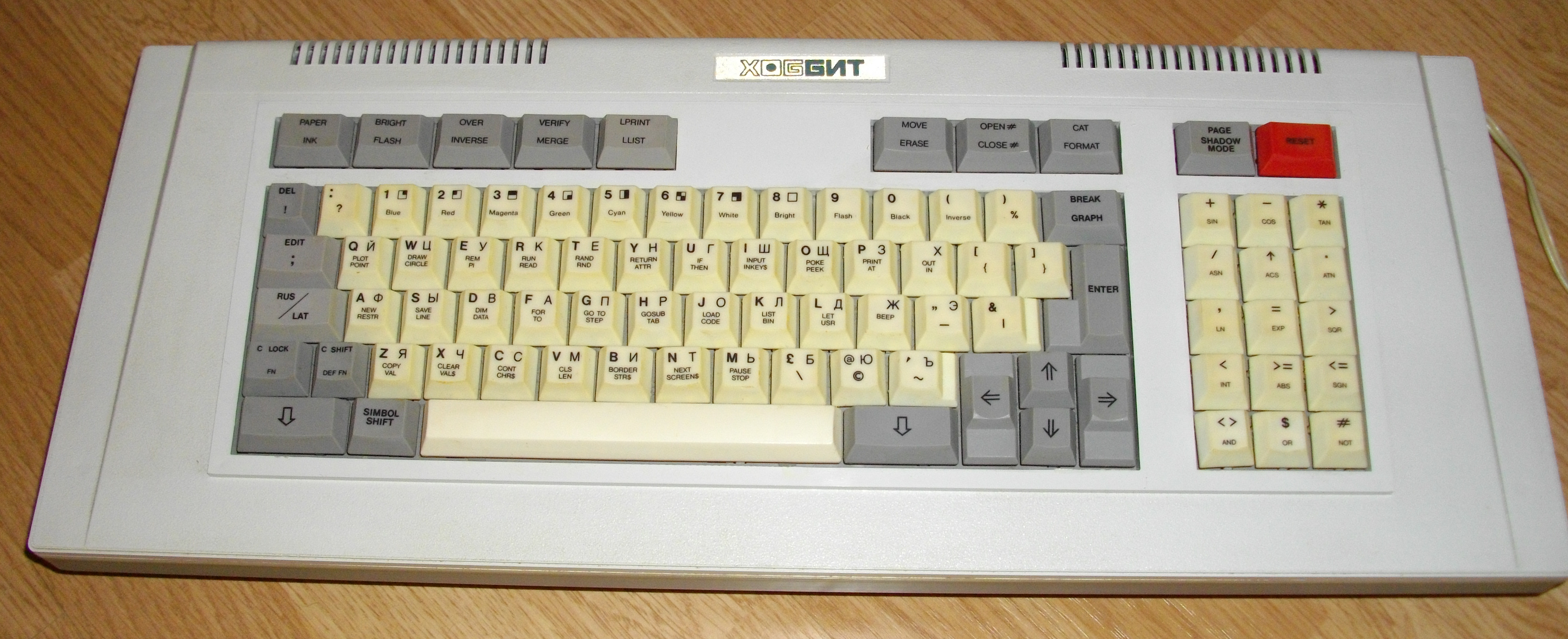 Компьютер ХОББИТ БК-0-31 производства INTERCOMPEX 1991